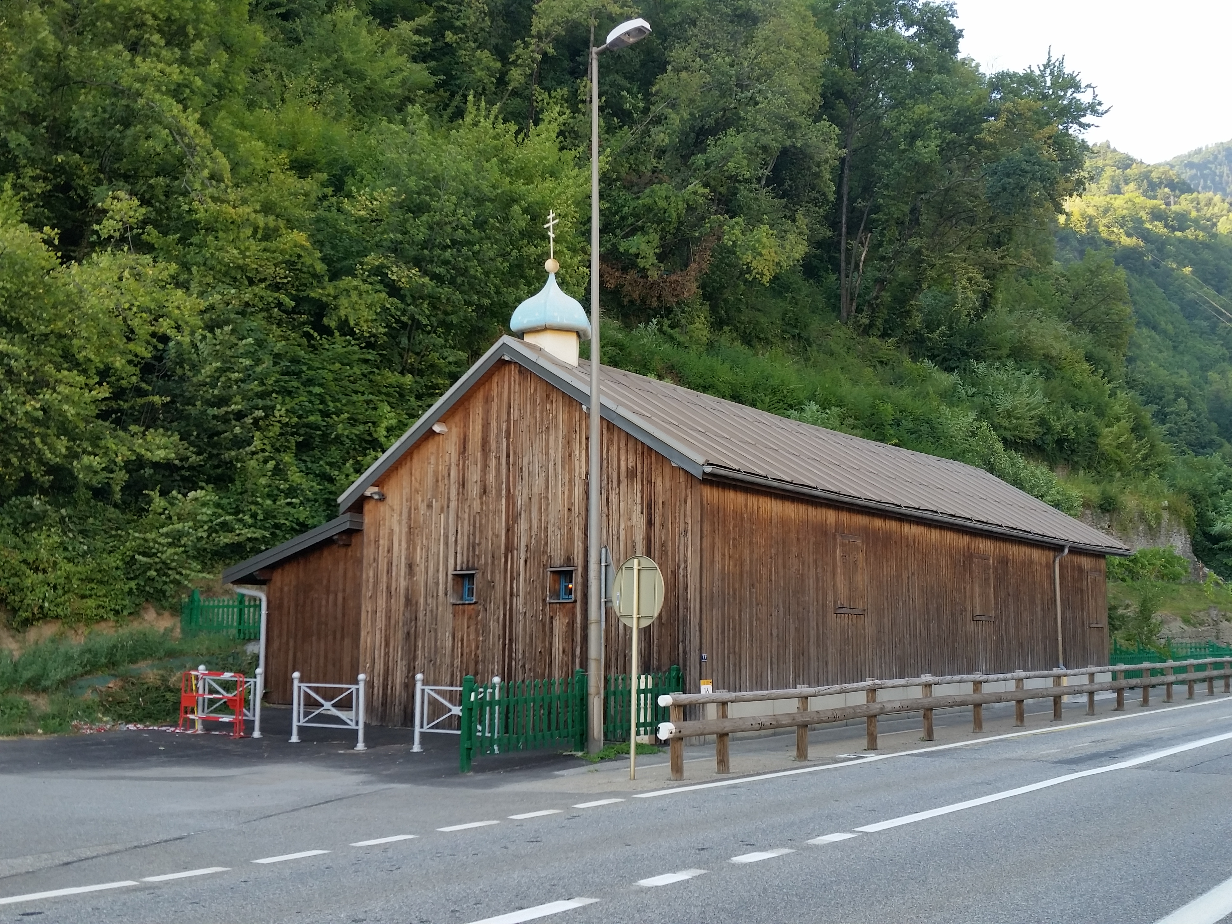 Église orthodoxe d'Ugine (Savoie, France), construite par les réfugiés russes arrivés après les révolutions de 1917. Le bâtiment est en face des Aciéries qui employaient nombre d'entre eux.